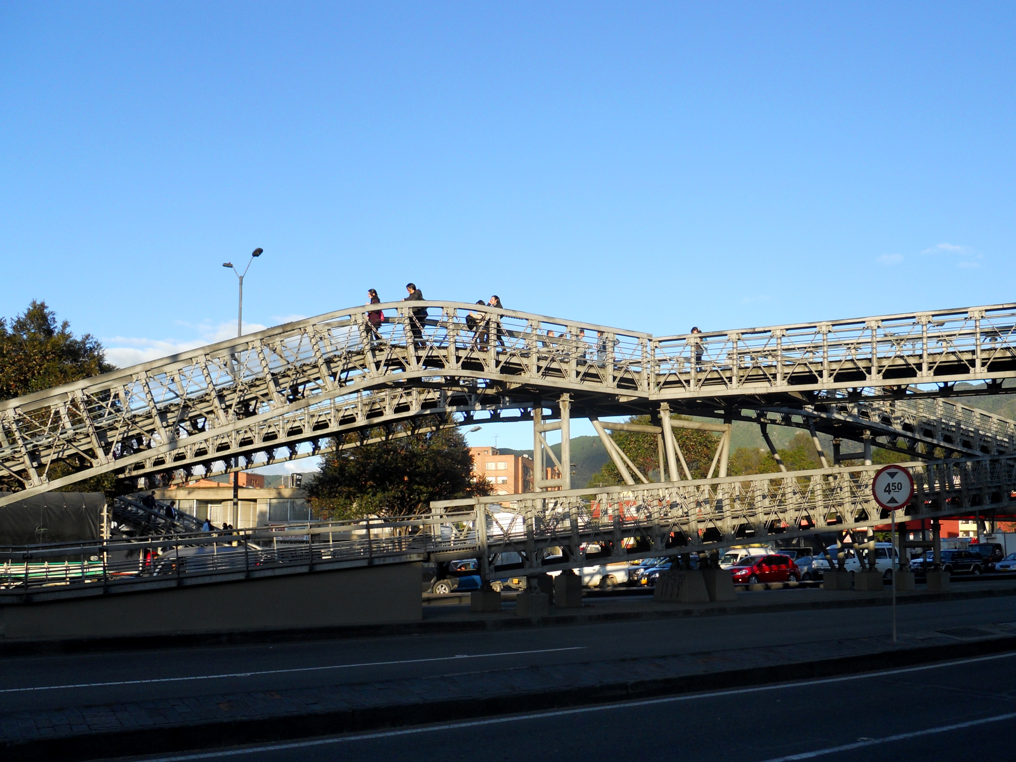 Estació Polo del sistema Transmilenio.